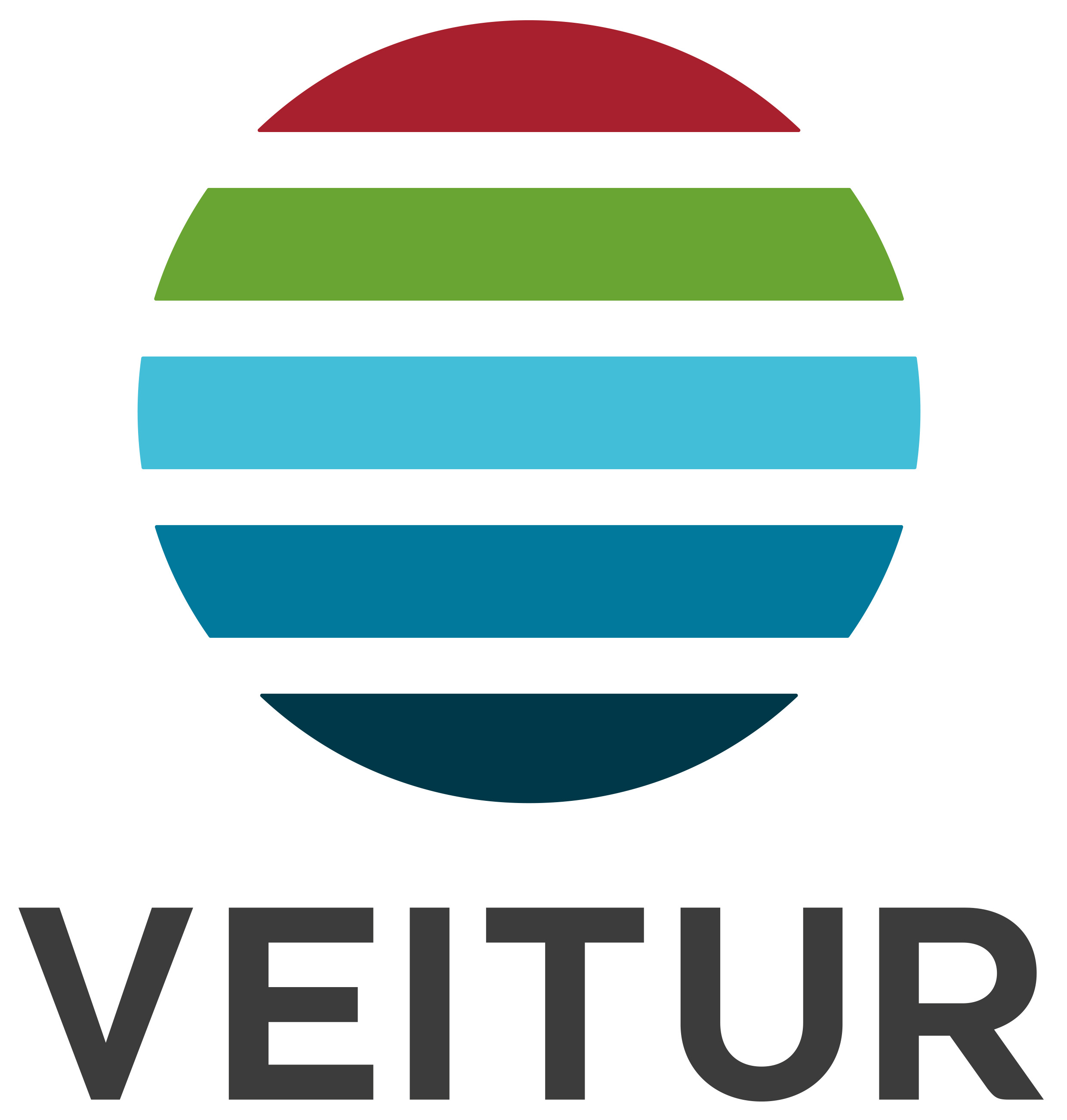 Vörumerki Veitna